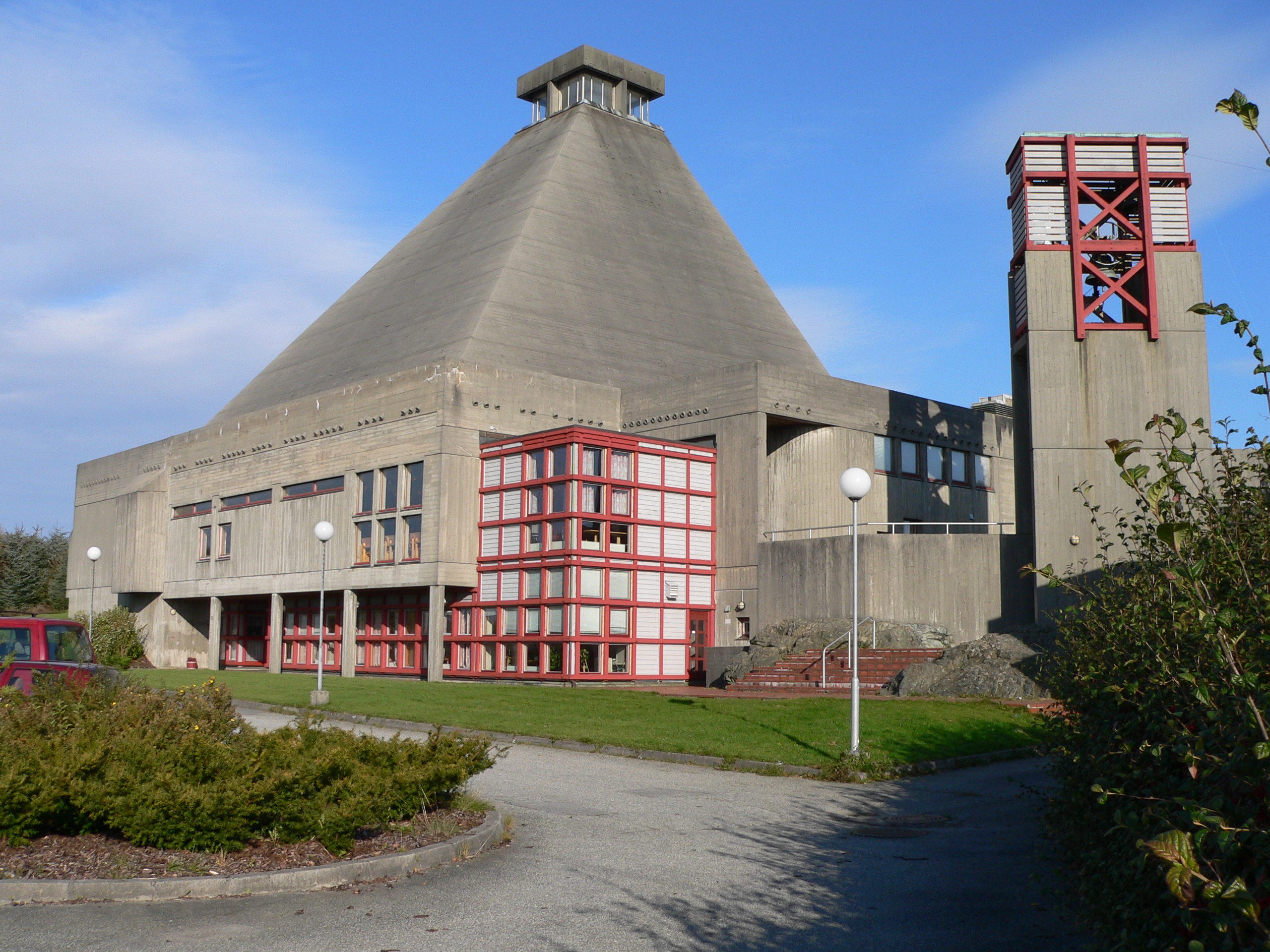 Rossabø kirke. Foto: Morten Stige. Fra Riksantikvarens Kulturminnesøk.